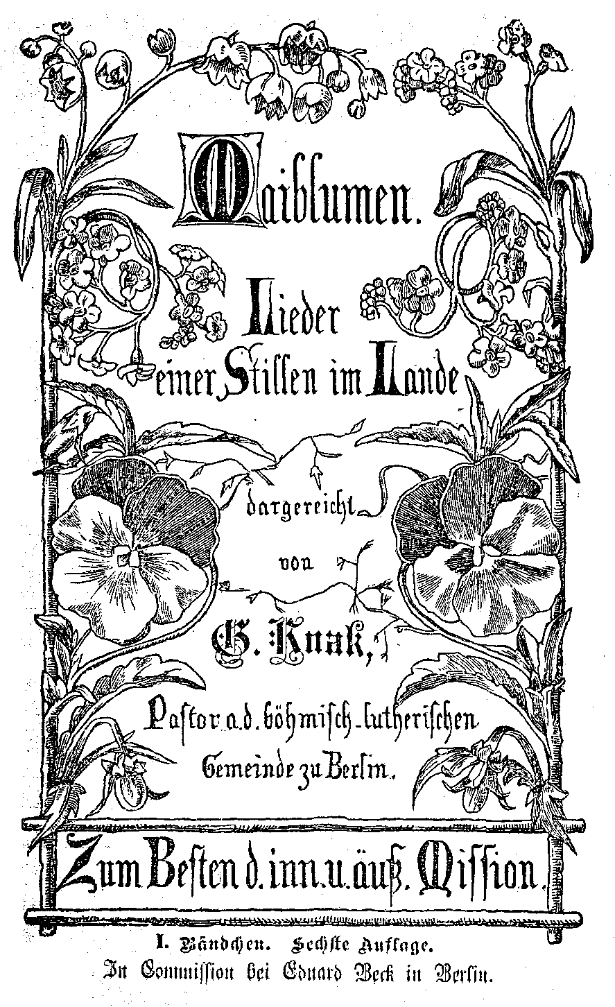 de: Dies ist ein Scan des Buchs: en: This is a scan of the book: Maiblumen. Lieder einer Stillen im Lande dargereicht von G. Knak, Pastor a. d. böhmisch-lutherischen Gemeinde zu Berlin. Zum Besten d. inn. u. äuß. Mission. I. Bändchen. Sechste Auflage. In Commission bei Eduard Beck in Berlin. VI, 168 S. Inhaltsverzeichnis ab S. 166.